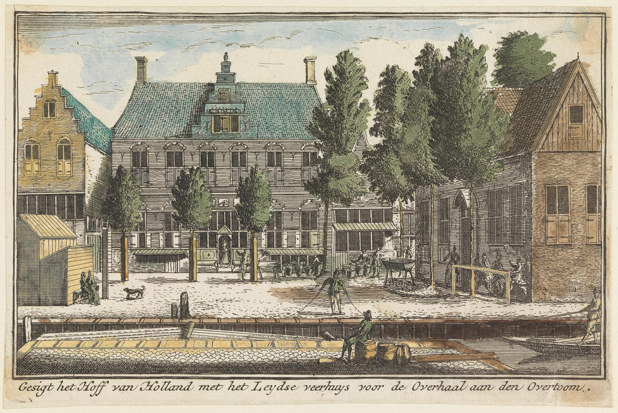 Gesigt het hoff van Holland met het Leydse veerhuys voor de overhaal aan den Overtoom